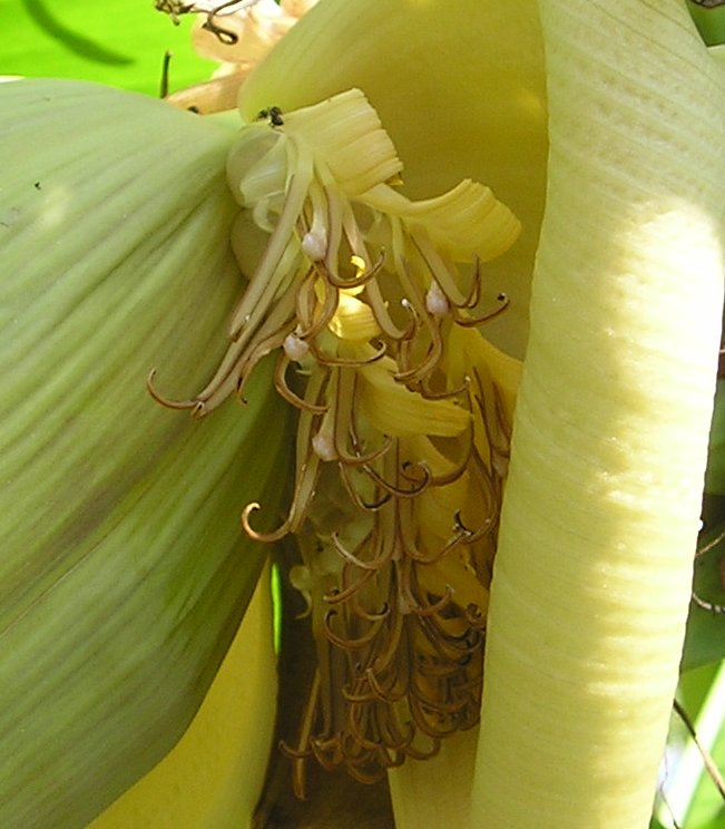 Afbeelding afkomstig van Franstalige Wikipedia: Description : Ceci est une photo de fleur de bananierSource & réalisateur: Adrien Paniel (Mon frère)